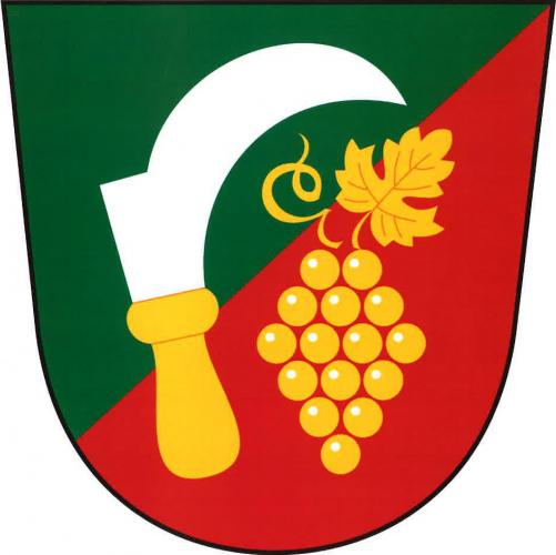 Kudlovice znak